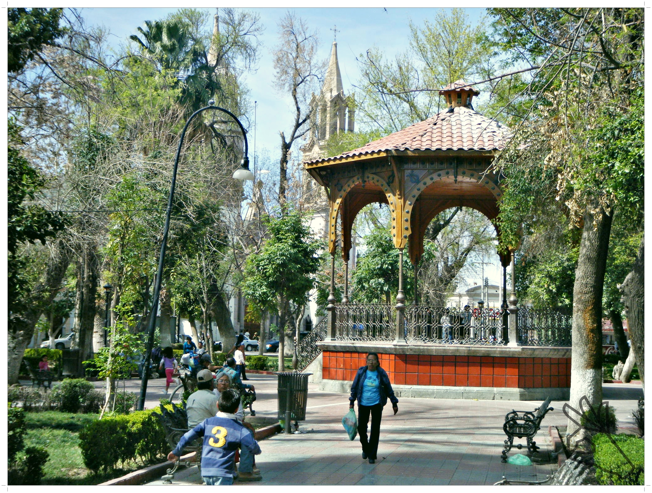 primer cuadro de la ciudad de lerdo durango